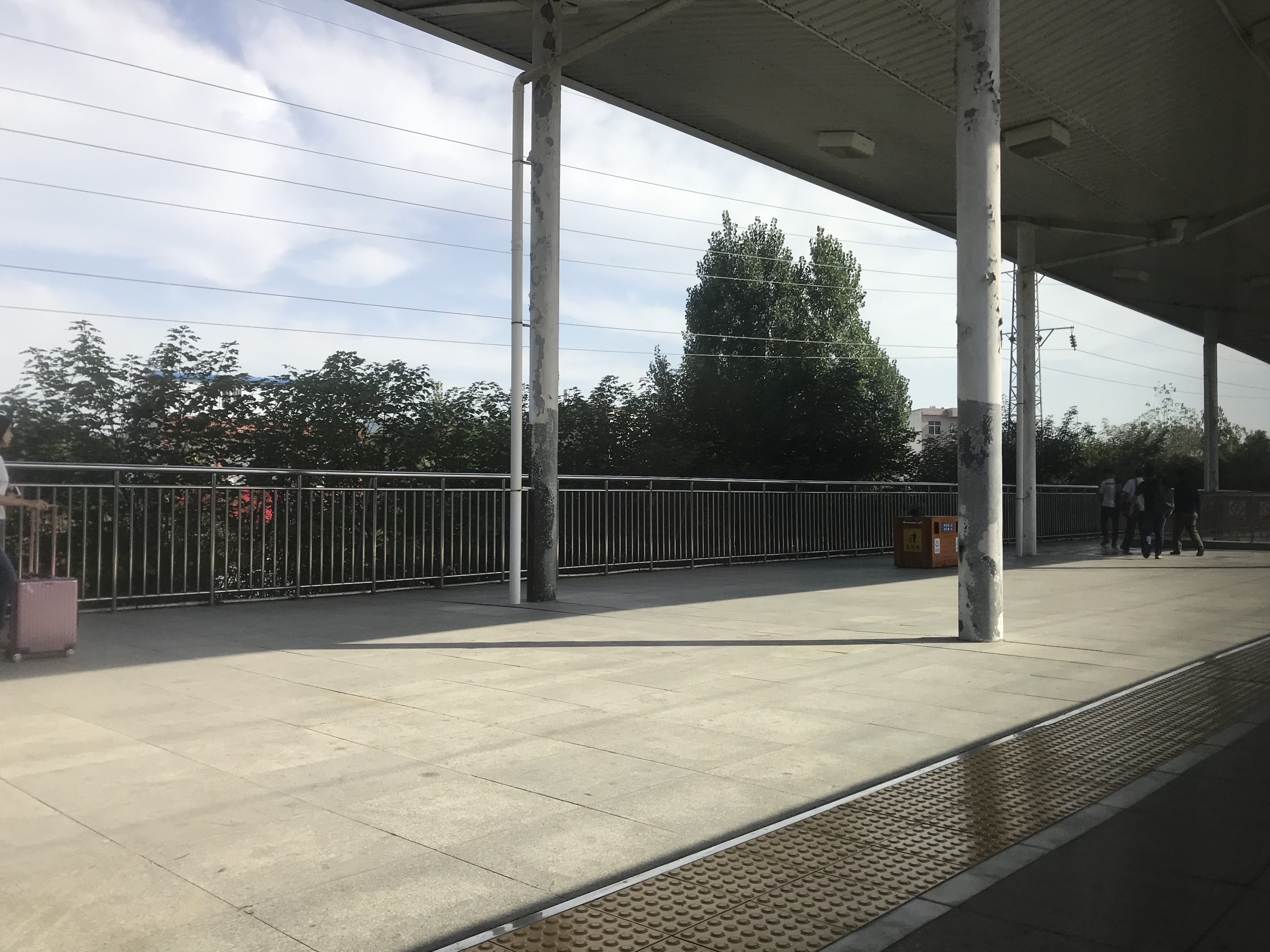 合武線の列車内より望む麻城北駅のホーム